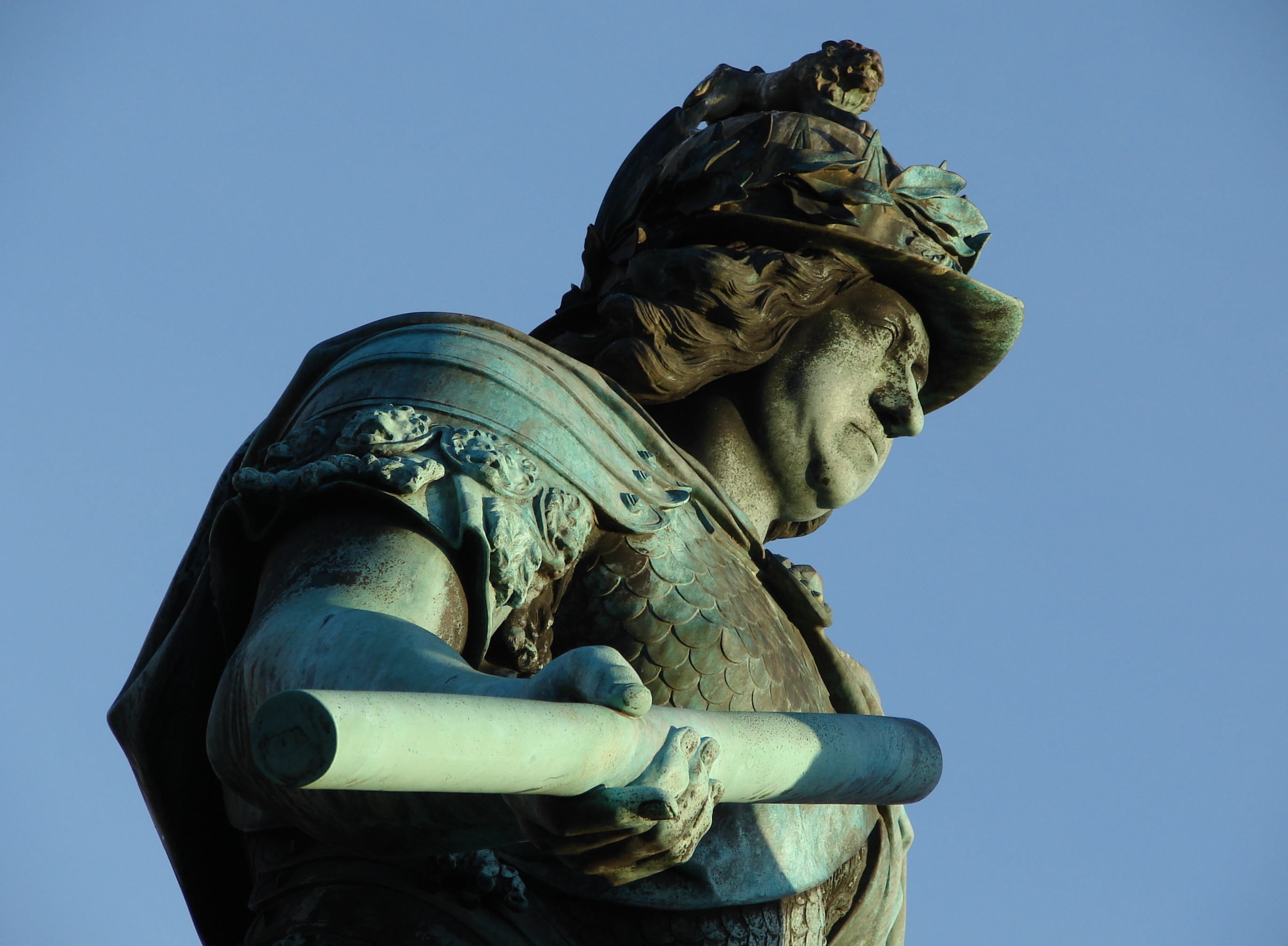 Detalje fra Abraham César Lamoureux' (- 1692) skulpturgruppe af kong Christian V, Kongens Nytorv, København